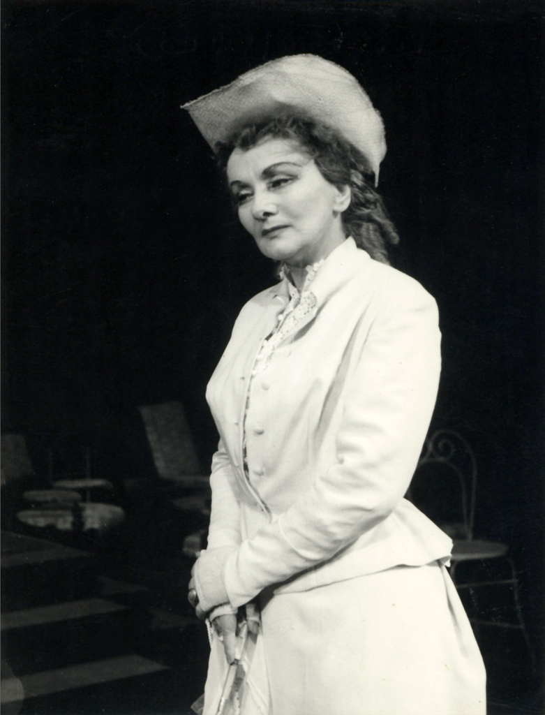 Jaroslaw Iwaszkiewicz, Poletje v Nohantu, Drama SNG v Ljubljani. Na fotografiji: Sava Sever (Ana).